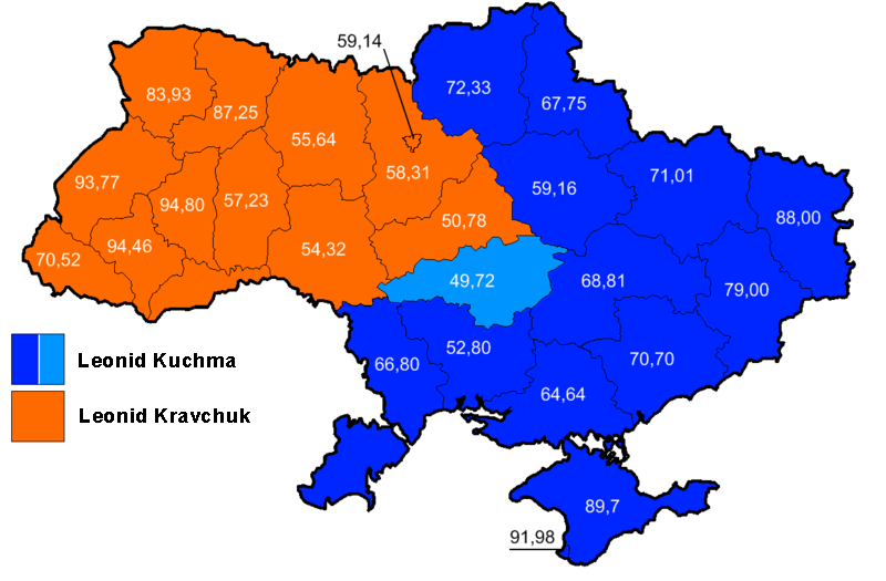 Вибори в Україні 1994